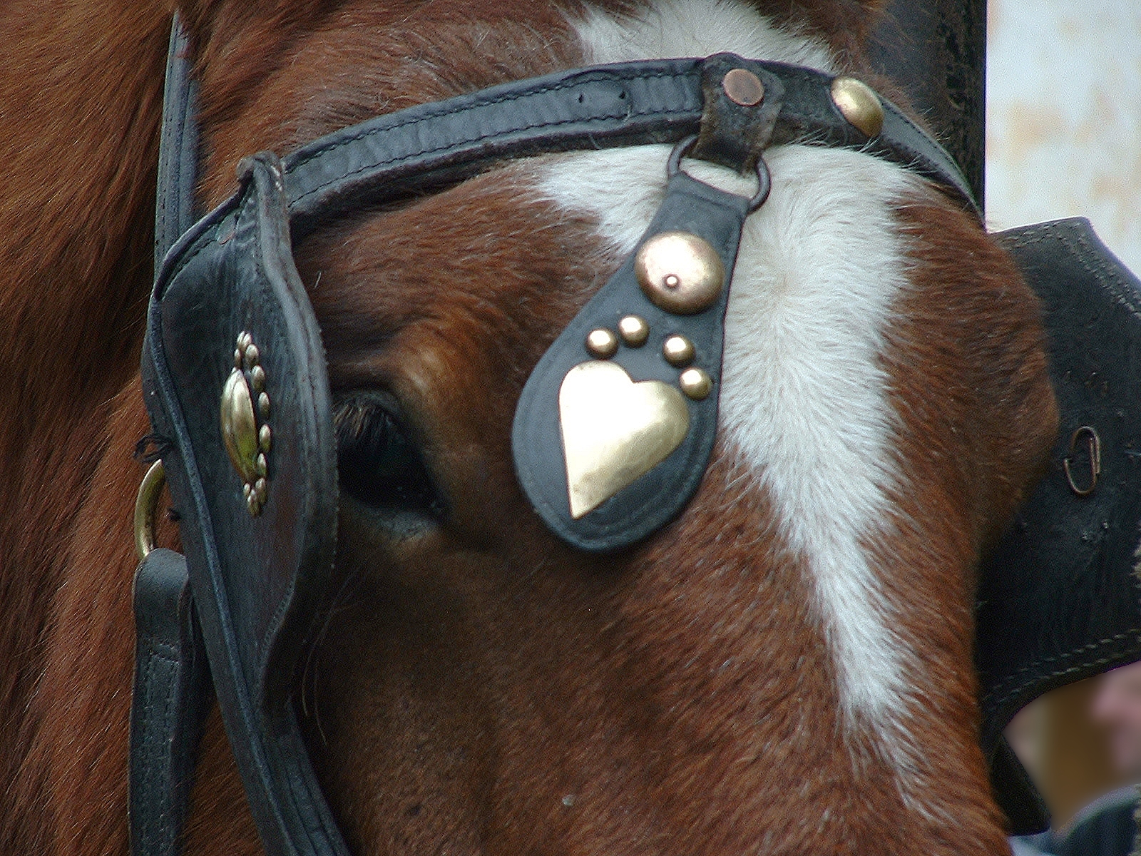 Jument trait du Nord de 30 mois pendant une démonstration de ferrage au Musée du Plein Air, Villeneuve d'Ascq, Nord, France. L'animal n'a manifesté aucune inquiétude durant la démonstration.